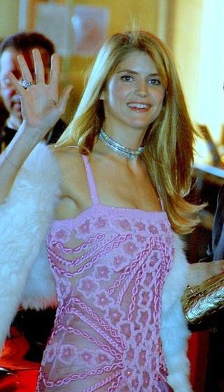 Alice Taglioni na předávání Césarů.